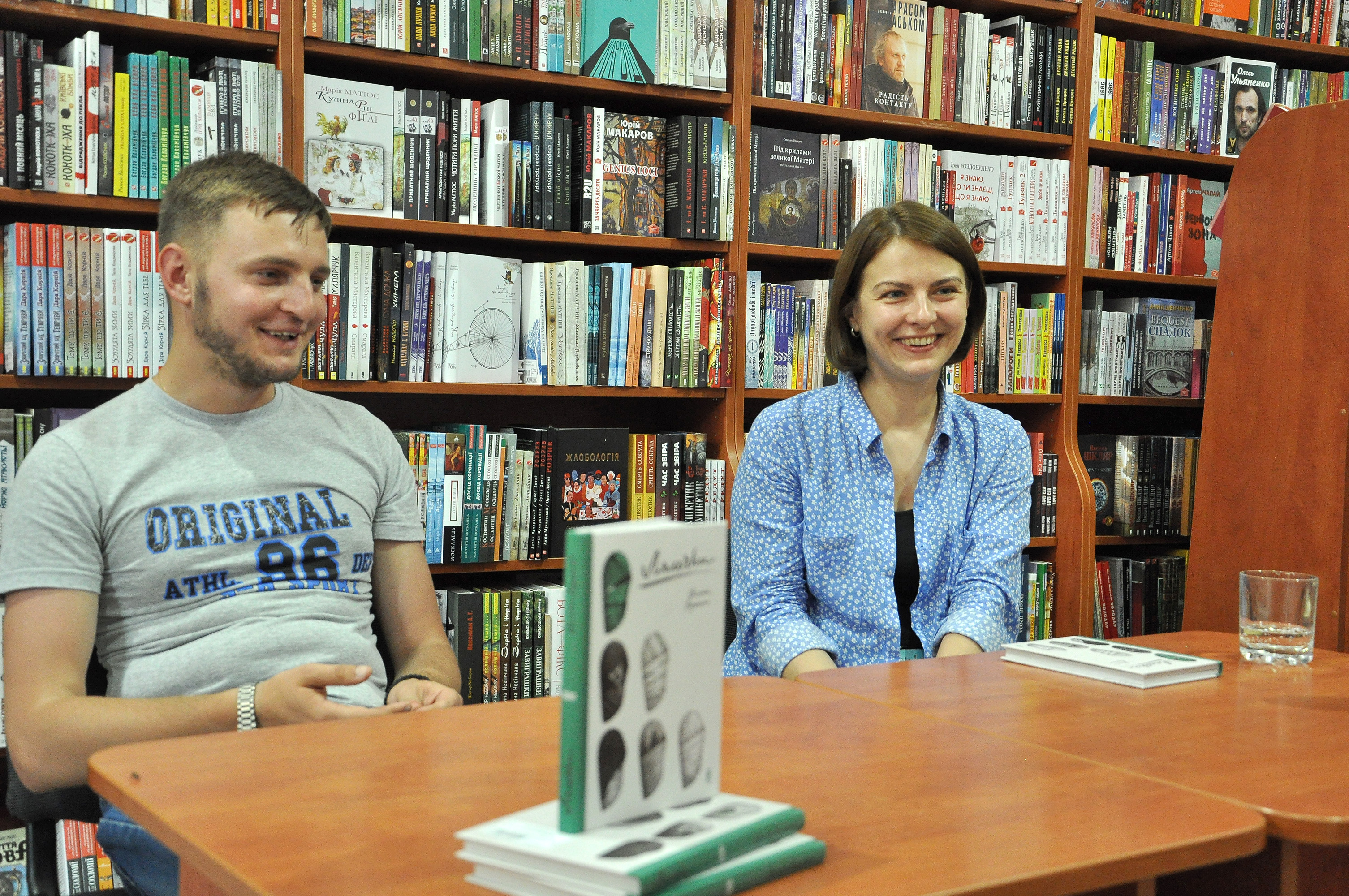 Презентація книжки Оксани Куценко «Лялечки» в книгарні «Є» в Тернополі 17 червня 2016 року.